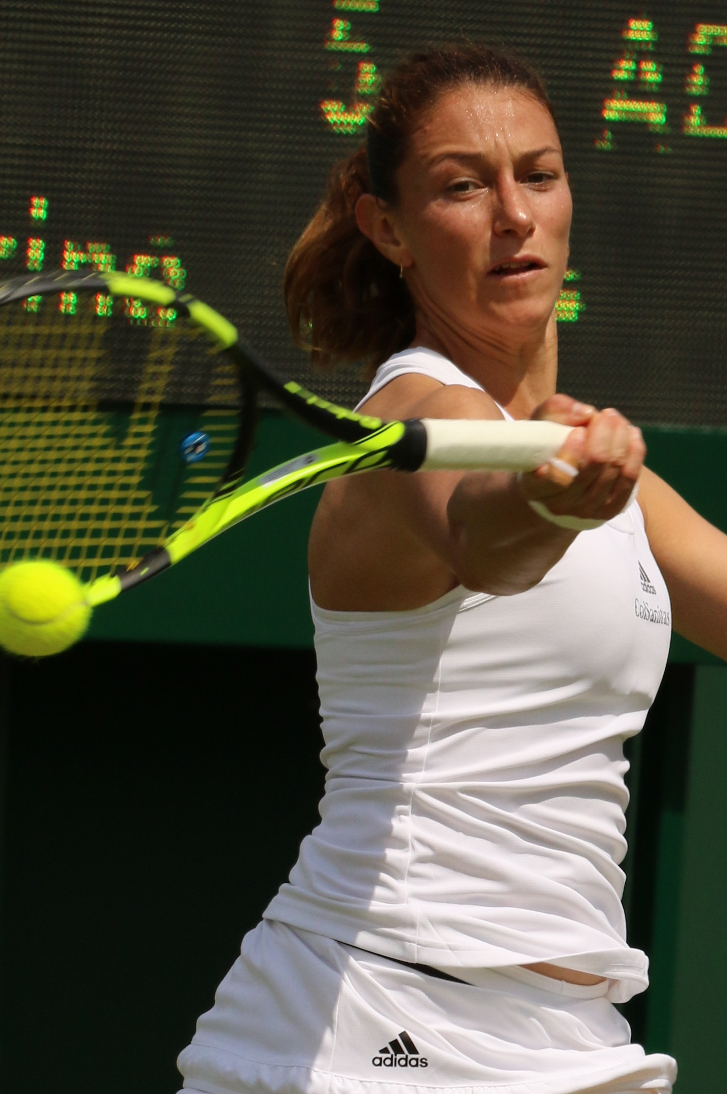 Duque Marino WM16 (14)